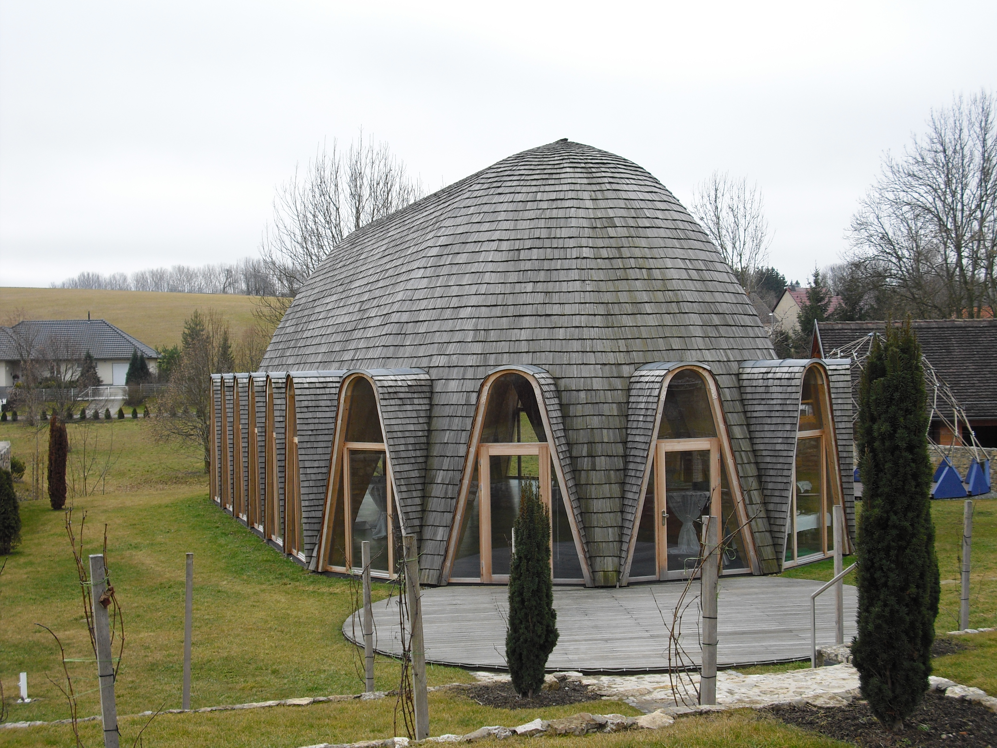 Maloca